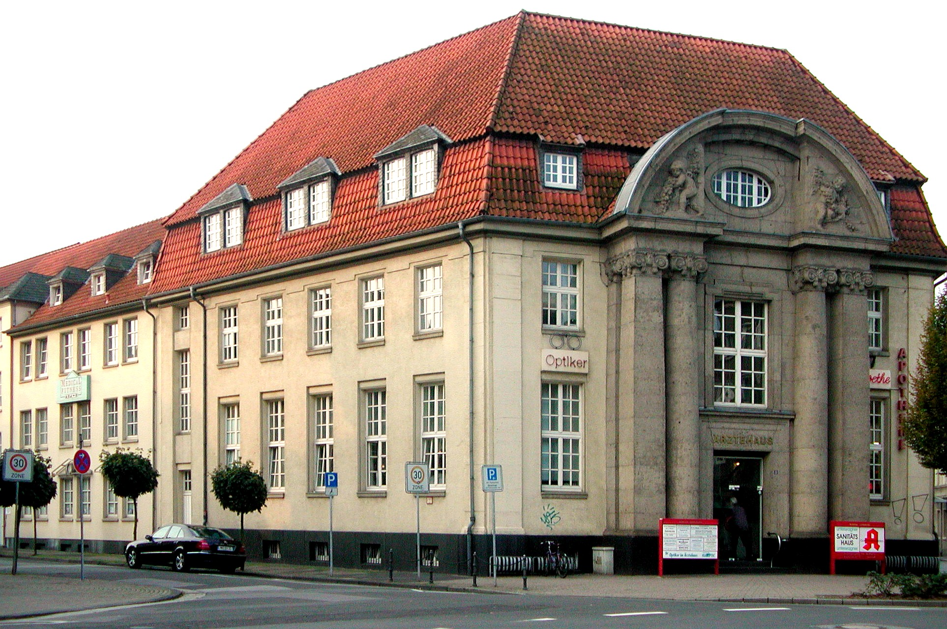 Das Moerser Ärztehaus in der Homberger Straße ist das ehemalige Gebäude der Sparkasse